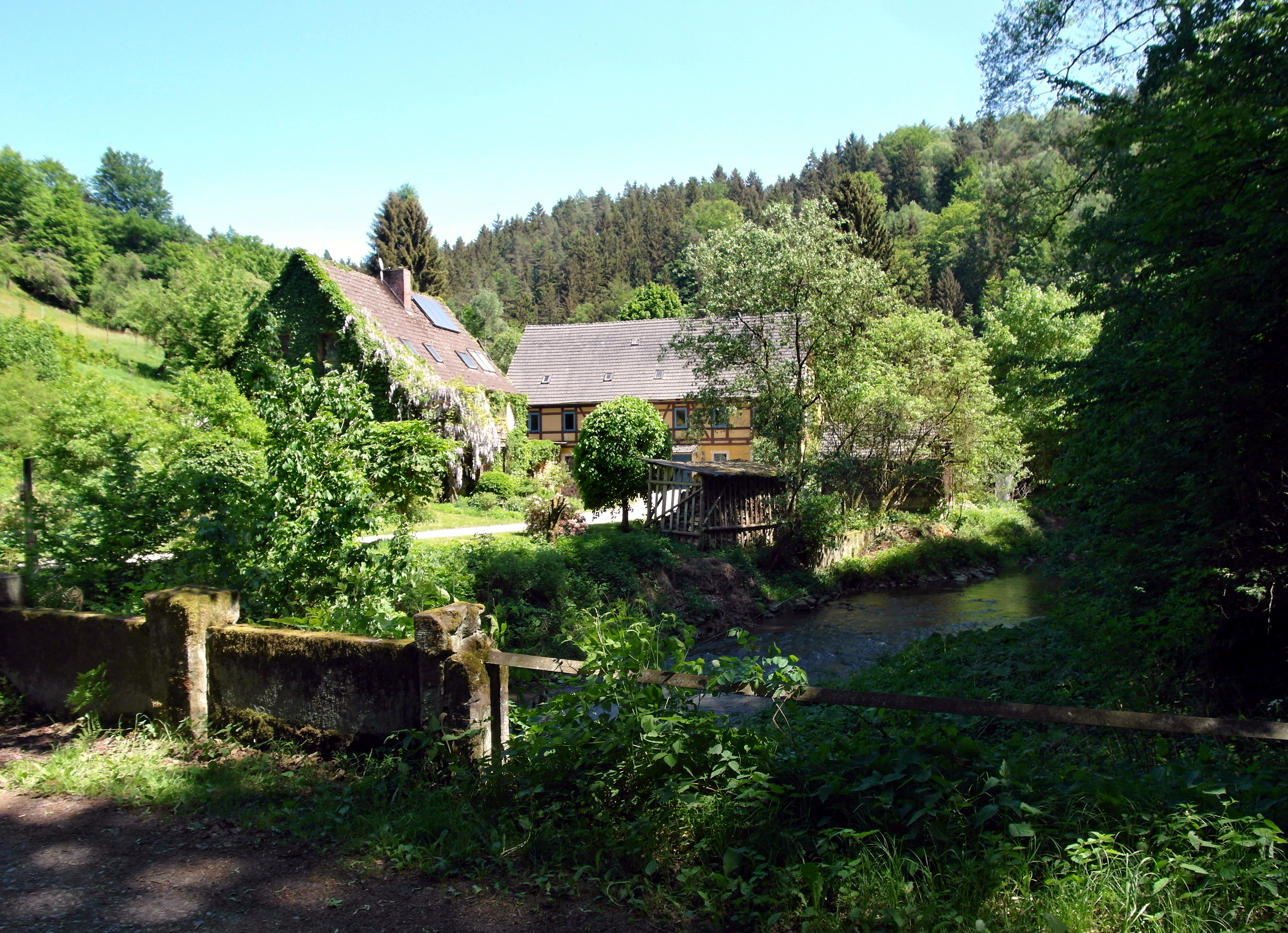 14.05.2018 01833 Heeselicht (Stolpen), Scheibenmühlenstraße 25: Heeselichtmühle (GMP: 50.996341,14.104266), ehemalige Wassermühle an der Polenz. Laut Türstockinschrift 1853 erbaut von E. E. Barthel. Heute Wohnhaus und Pension. [SAM6200.JPG]20180514400DR.JPG(c)Blobelt